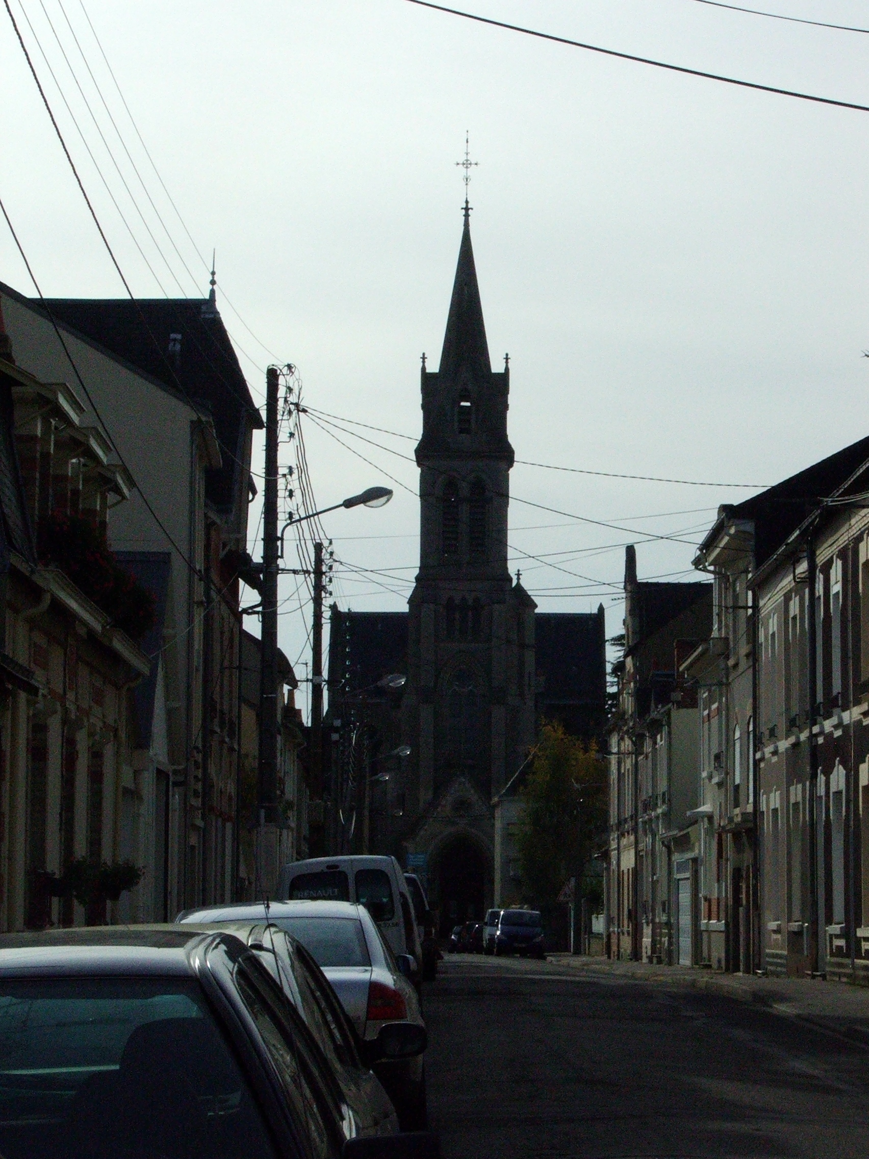 L'Eglise de Saint-Pavin dans le quartier du même nom au Mans.